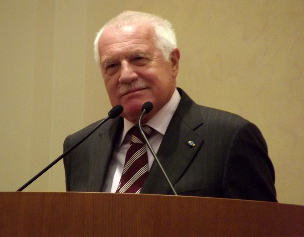 Zdjęcie zrobione podczas wizyty pary prezydenckiej Republiki Czeskiej w Krakowie.